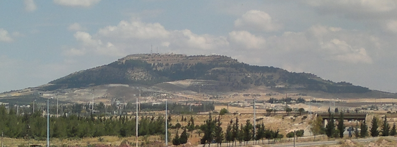 جبل زين العابدين شمال مدينة جماة